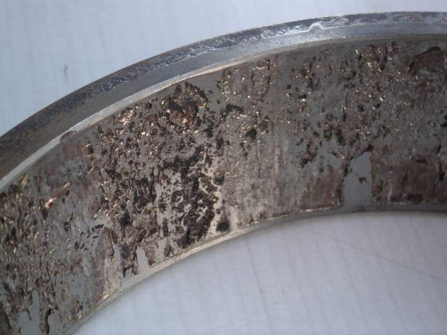 Écaillage sévère sur une bague de roulement